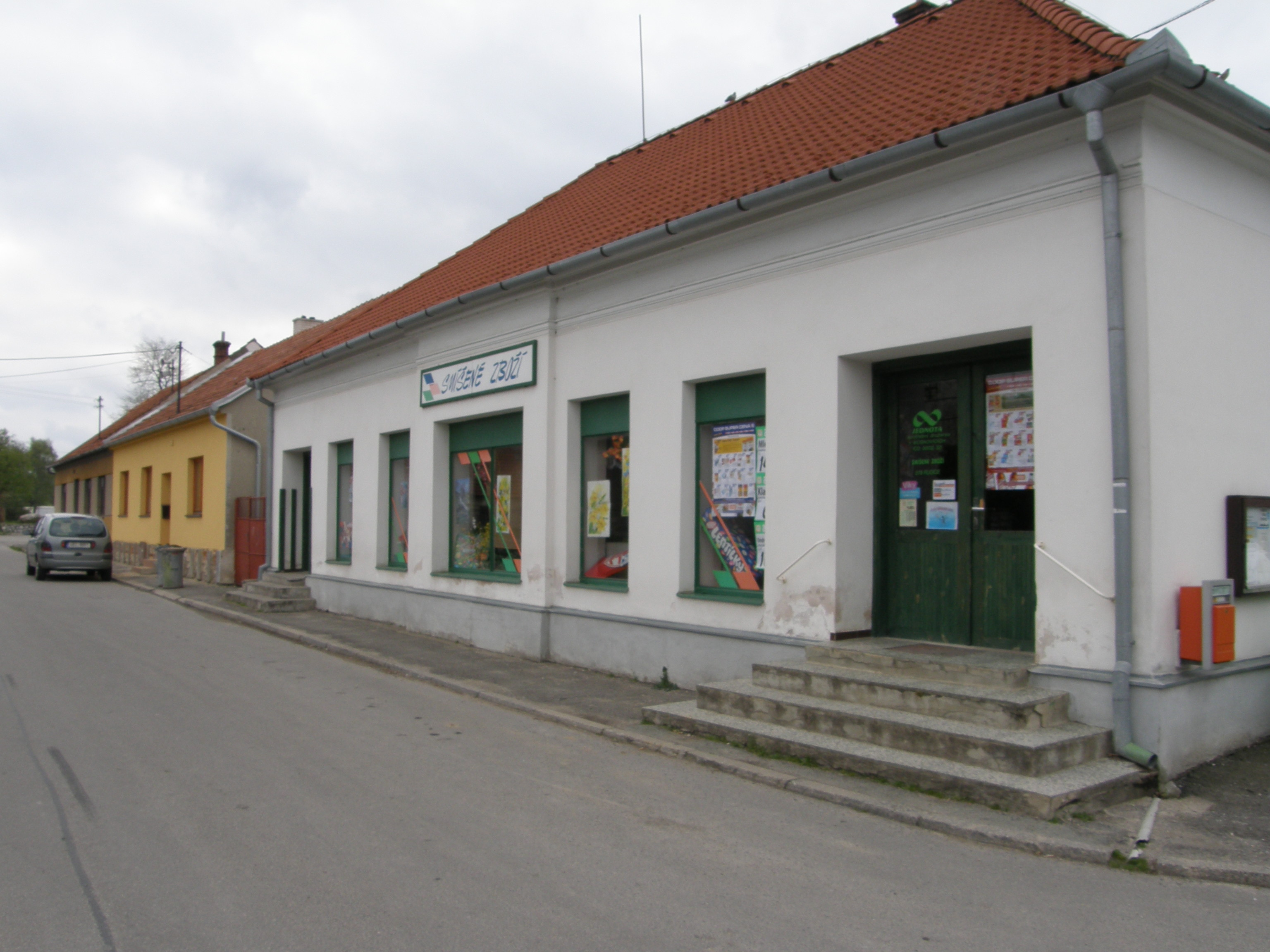 Rudice - Jednota